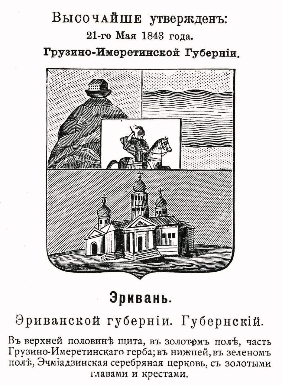 Official Russian Empire coat of arms: Erevan. Герб Российской Империи города Эривань с официальным описанием в Гербовнике Винклера.